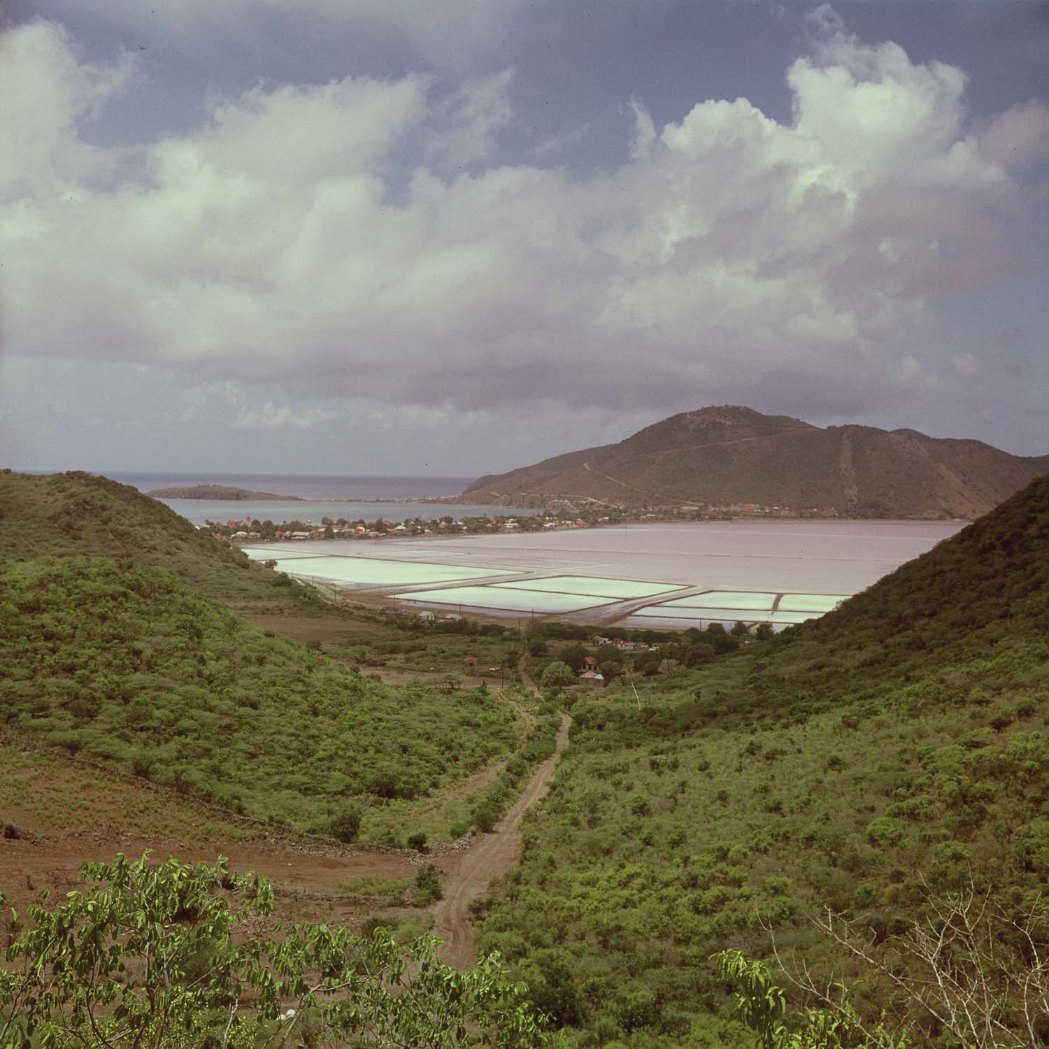 Dia.